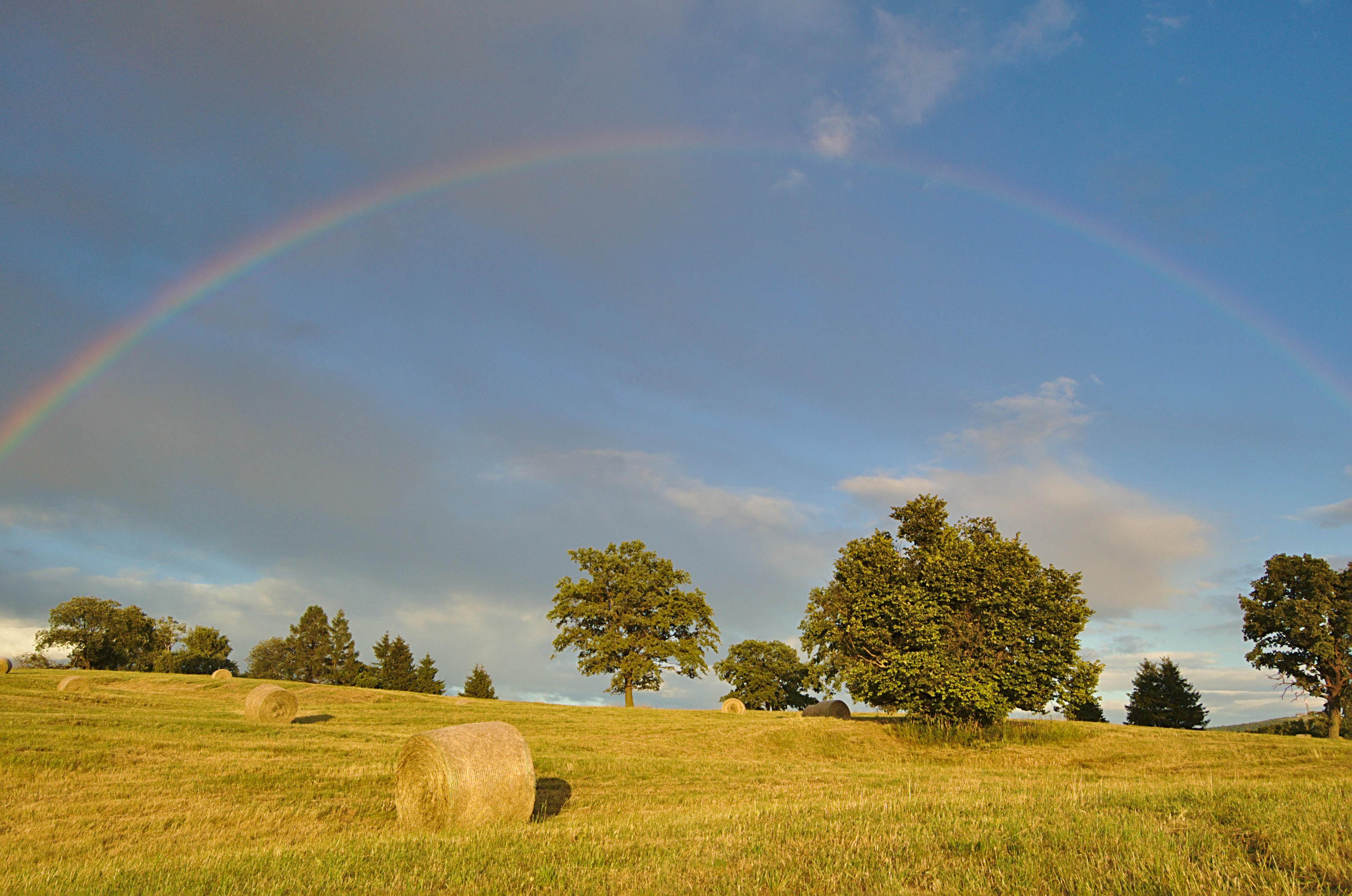 Kopec Lesná, okres Uherské Hradiště